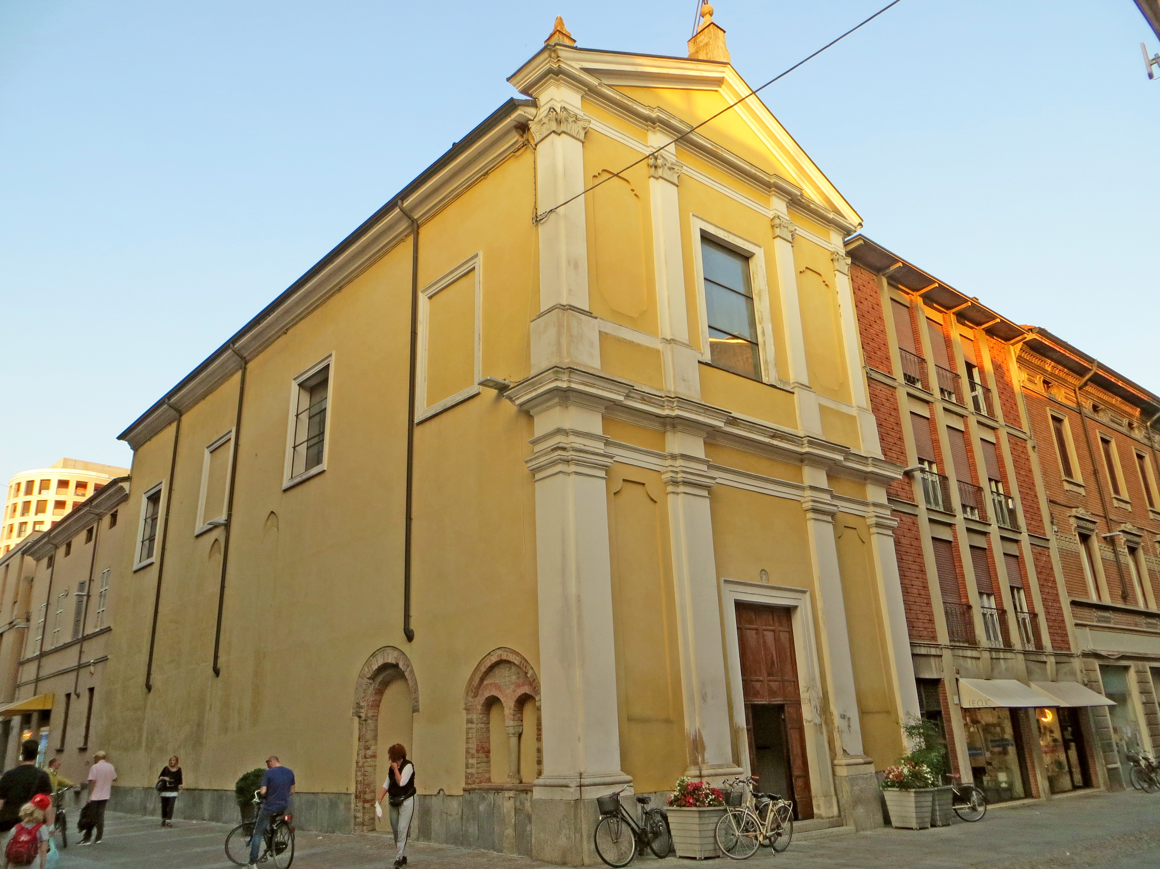 Chiesa di Santa Maria Annunziata (Fidenza) - facciata e lato ovest